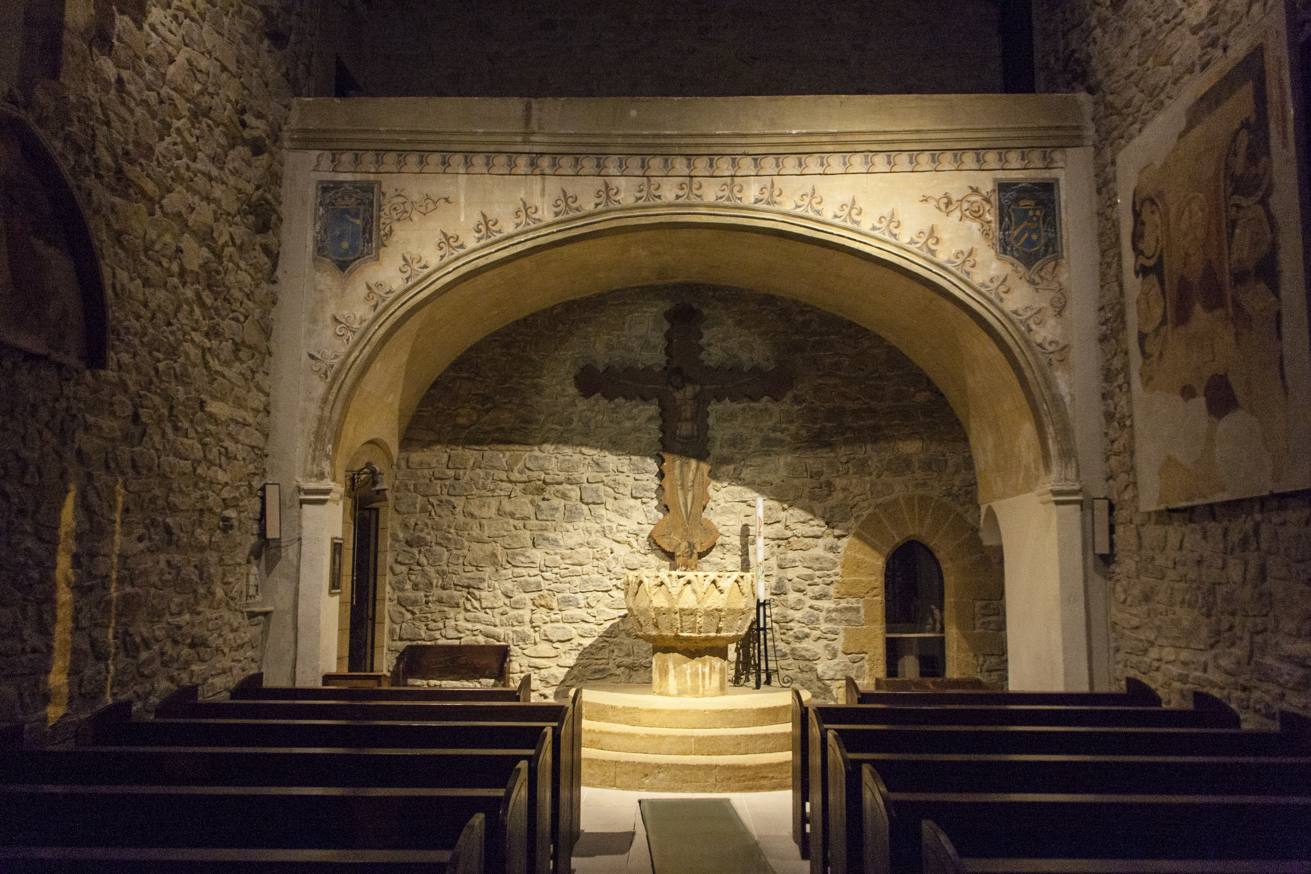 Interni abbazia di Santo Spirito